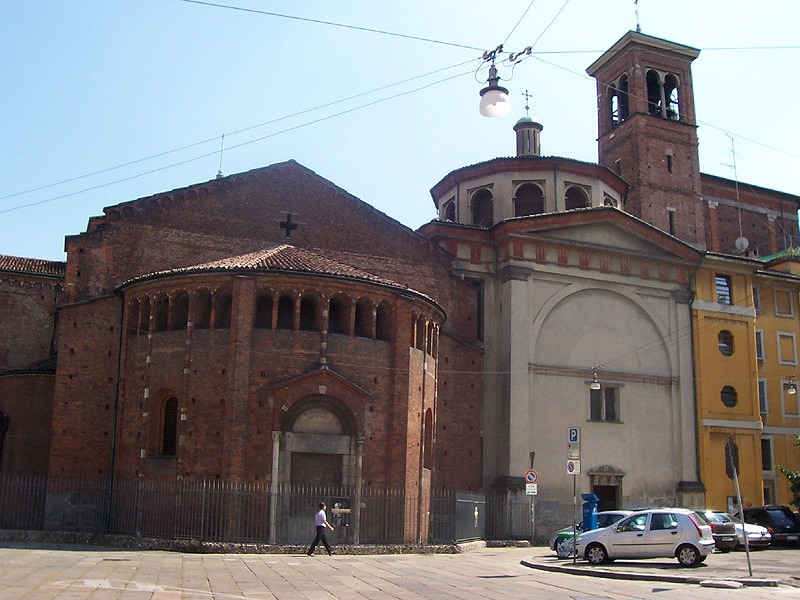 Milano - Basilica di S. Nazaro Maggiore vista da Via Pantano